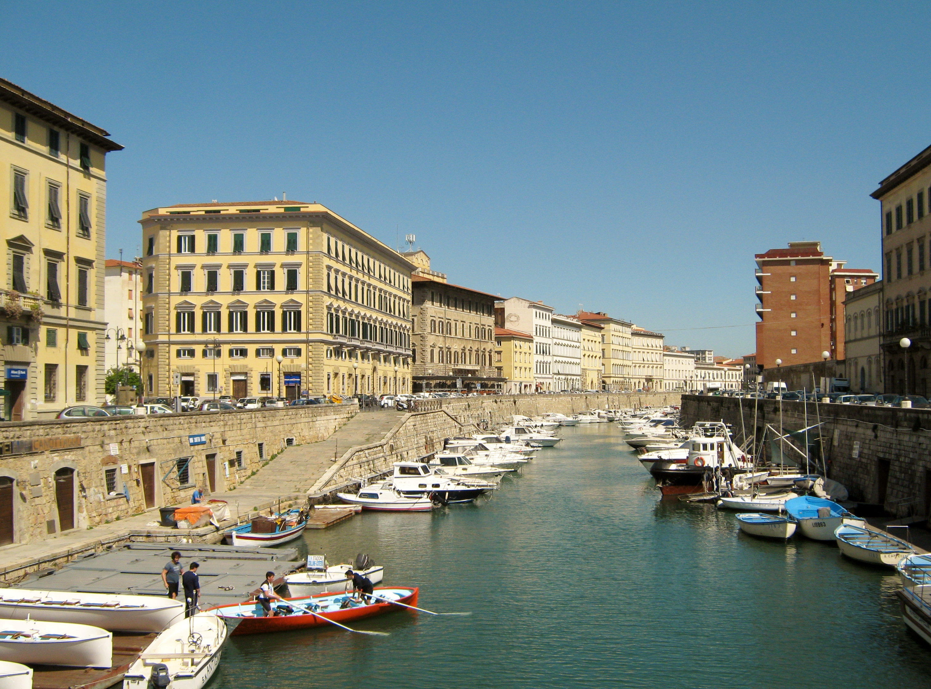 Livorno, Fosso Reale, palazzi ottocenteschi che affacciano sugli scali D'Azeglio.